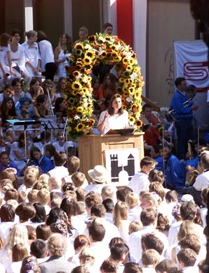 Brugger Rutenzug, Morgenfeier, Rede Freudenstein